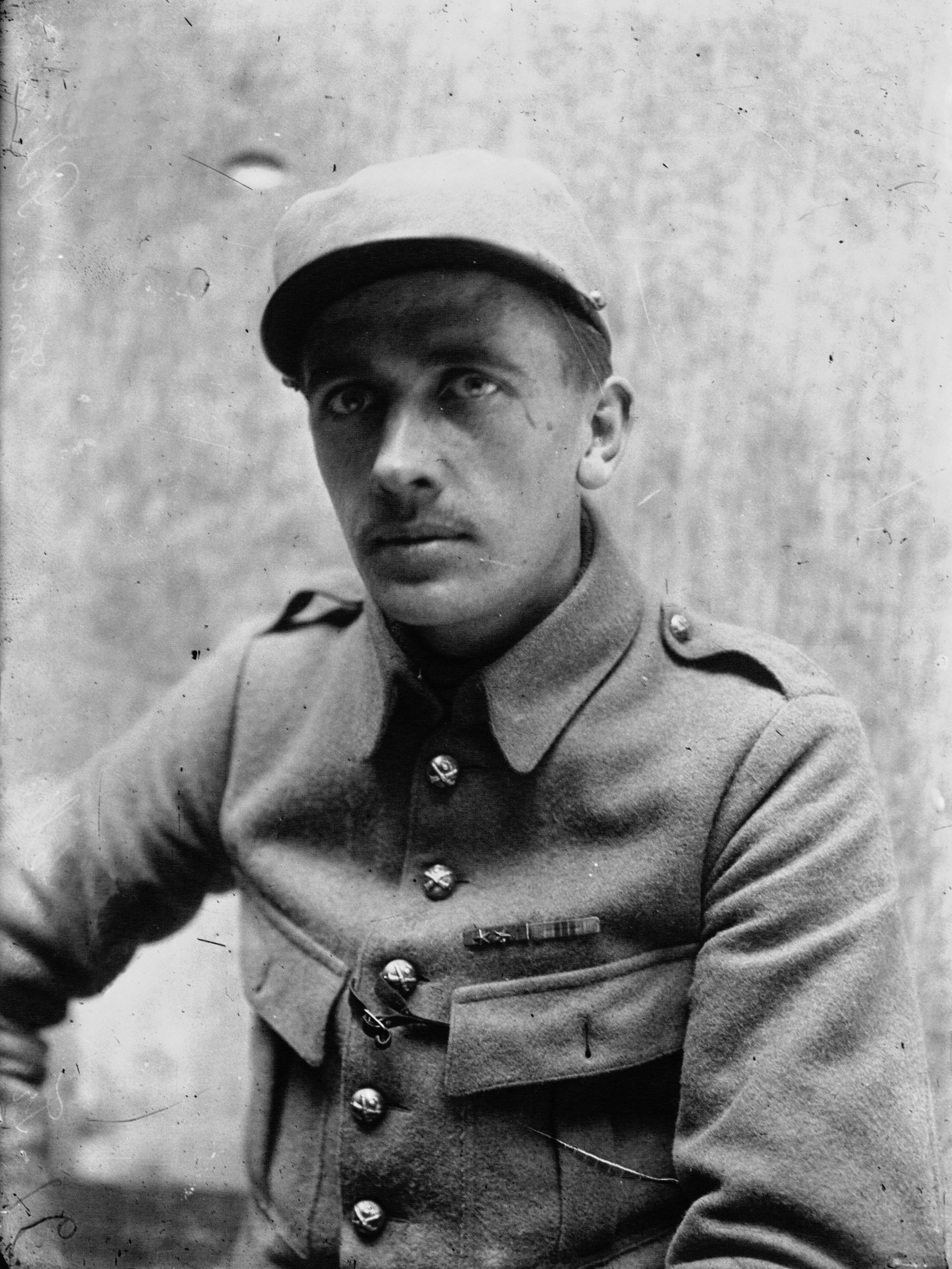 Paris-Roubaix cycliste : Francis Pelissier.